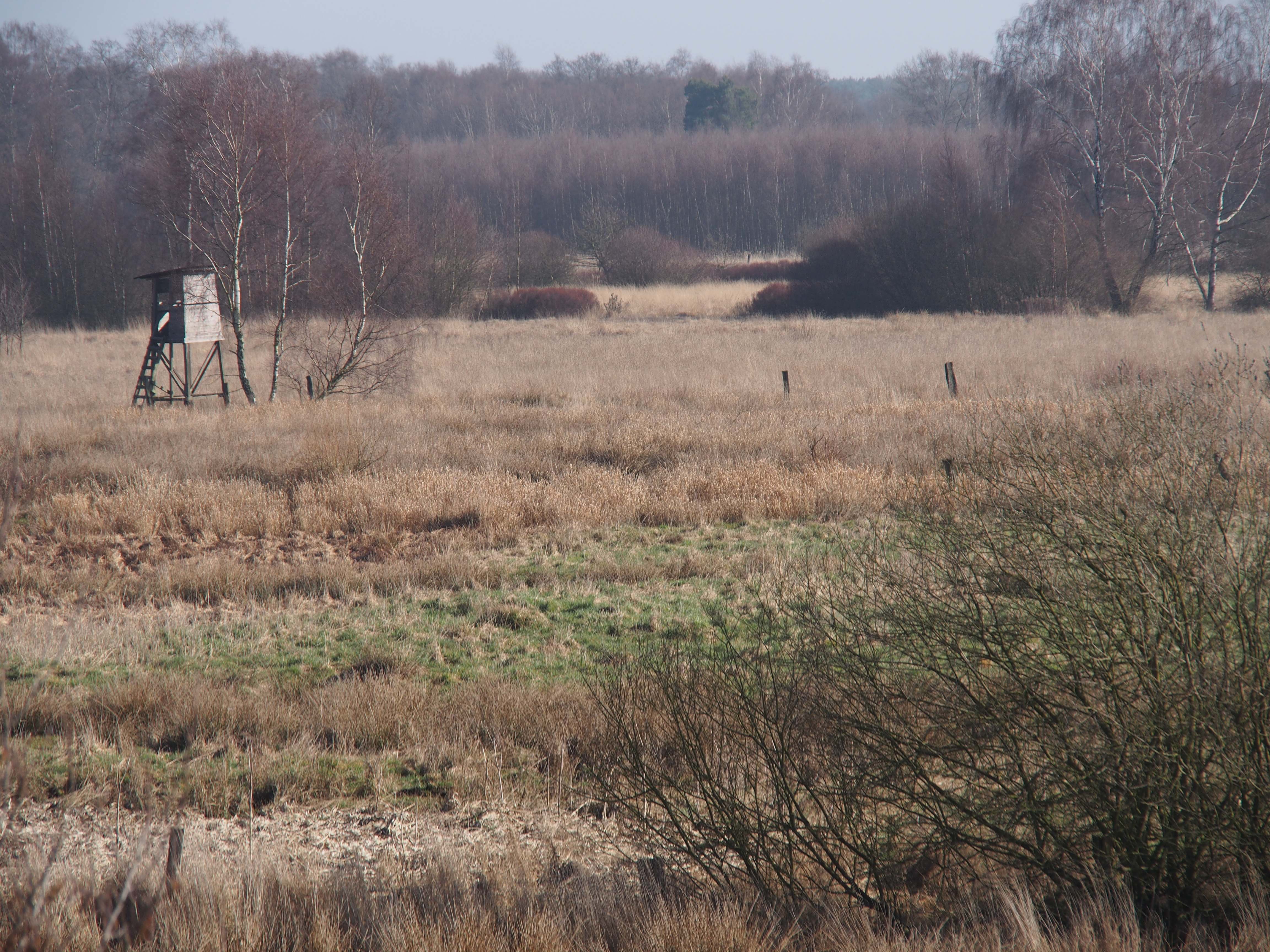 Postmoor (NSG Lutter) bei Bargfeld, Gemeinde Eldingen, Landkreis Celle